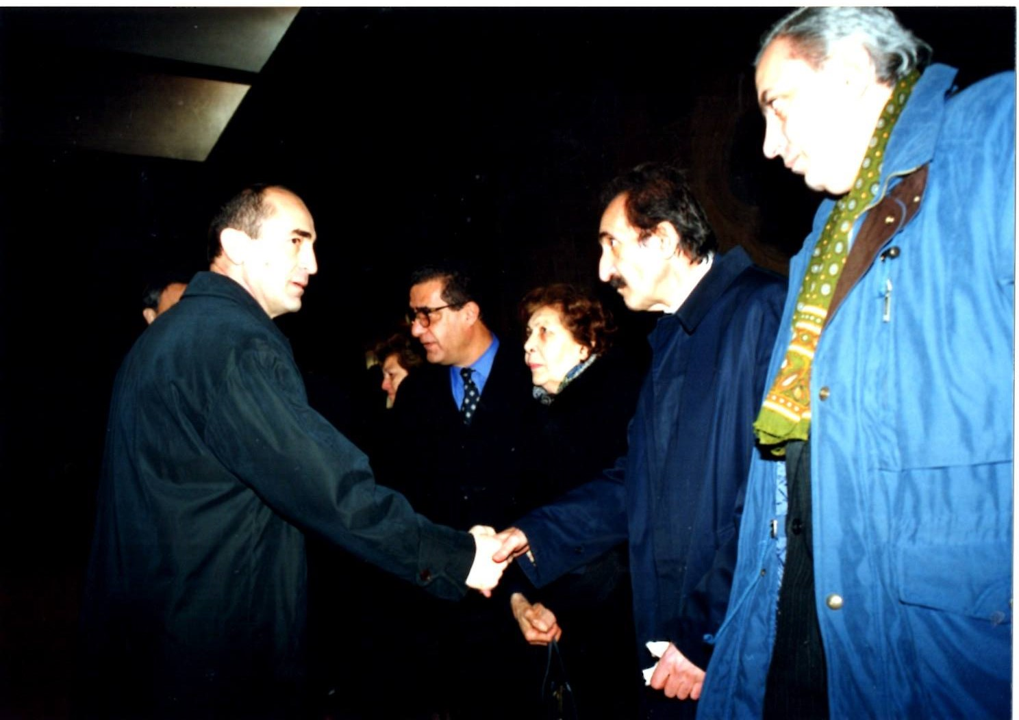 Խաժակ Տեր Գրիգորյան